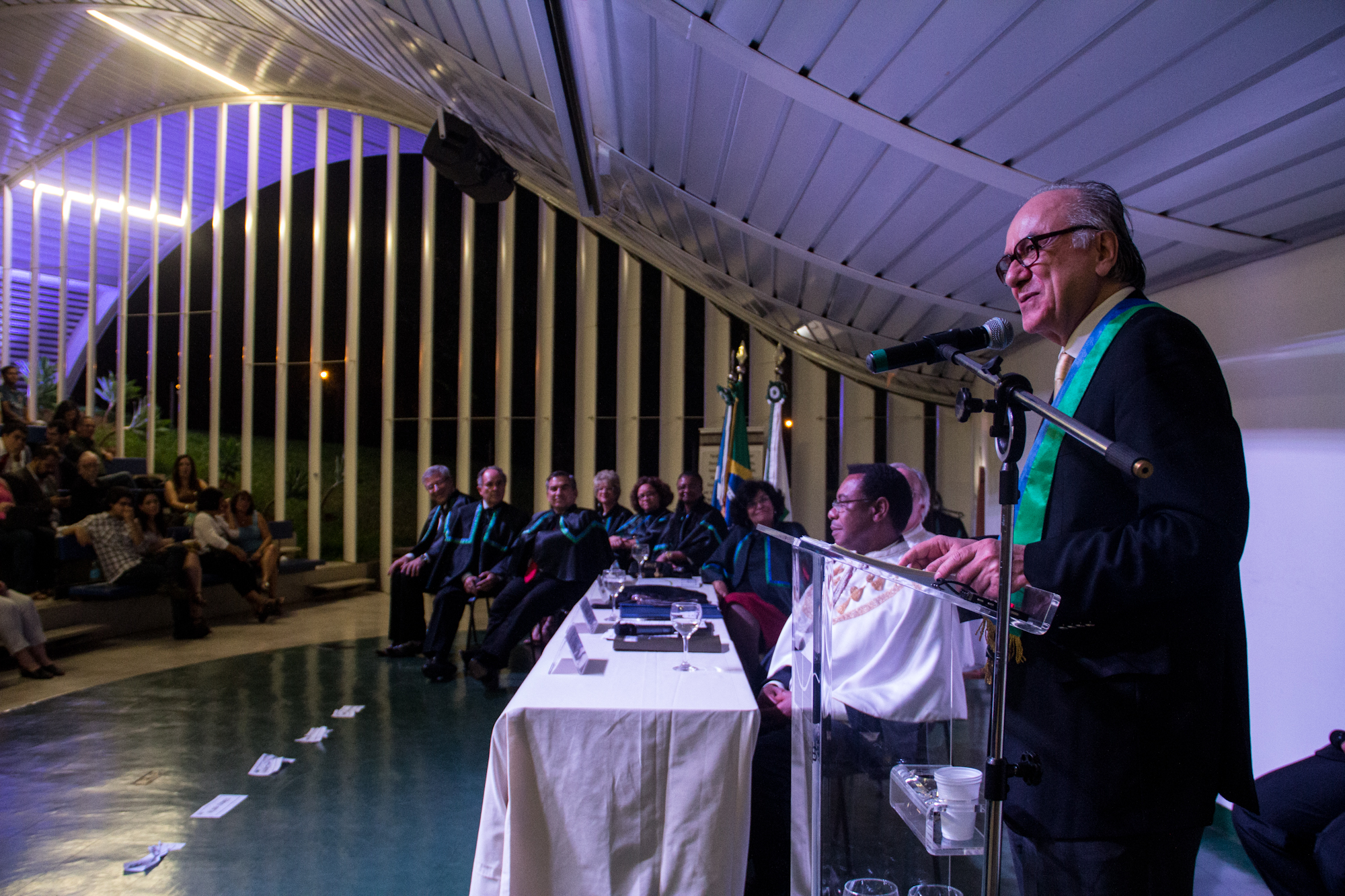 Foto: Emília Silberstein